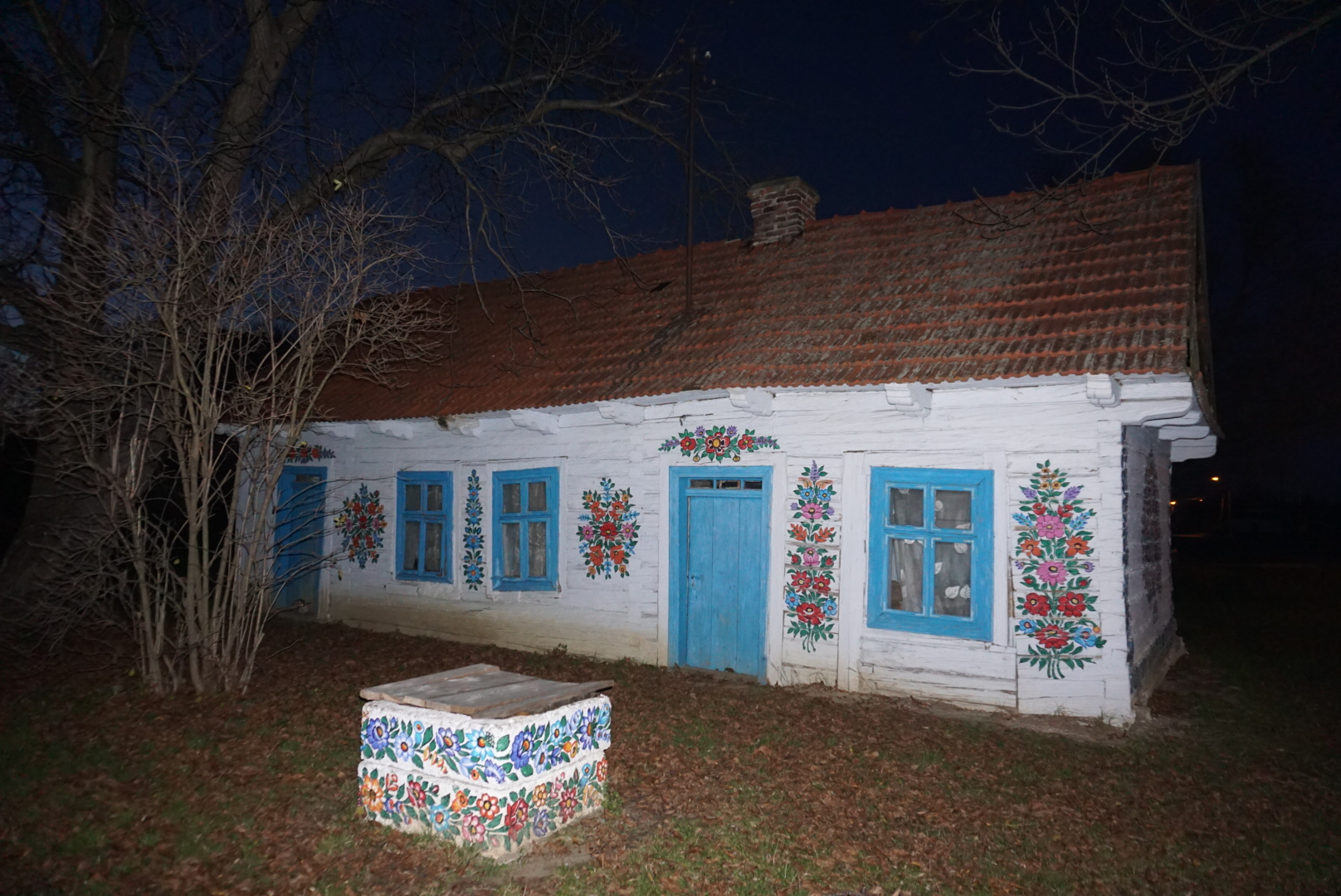 L'une des plus anciennes maison à Zalpie, peintures sur bois